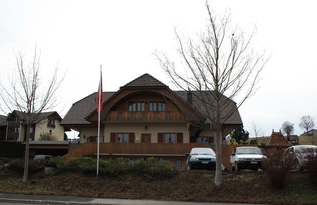 Gasthof Laterne, Zumholz, Kanton Freiburg, Schweiz